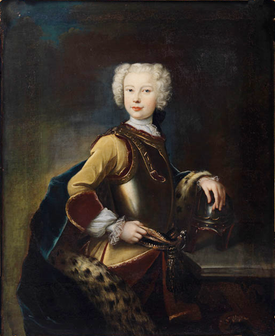 Dreiviertelportrait des jungen Karl Friedrich markgraf von Baden-Durlach (1728-1811)